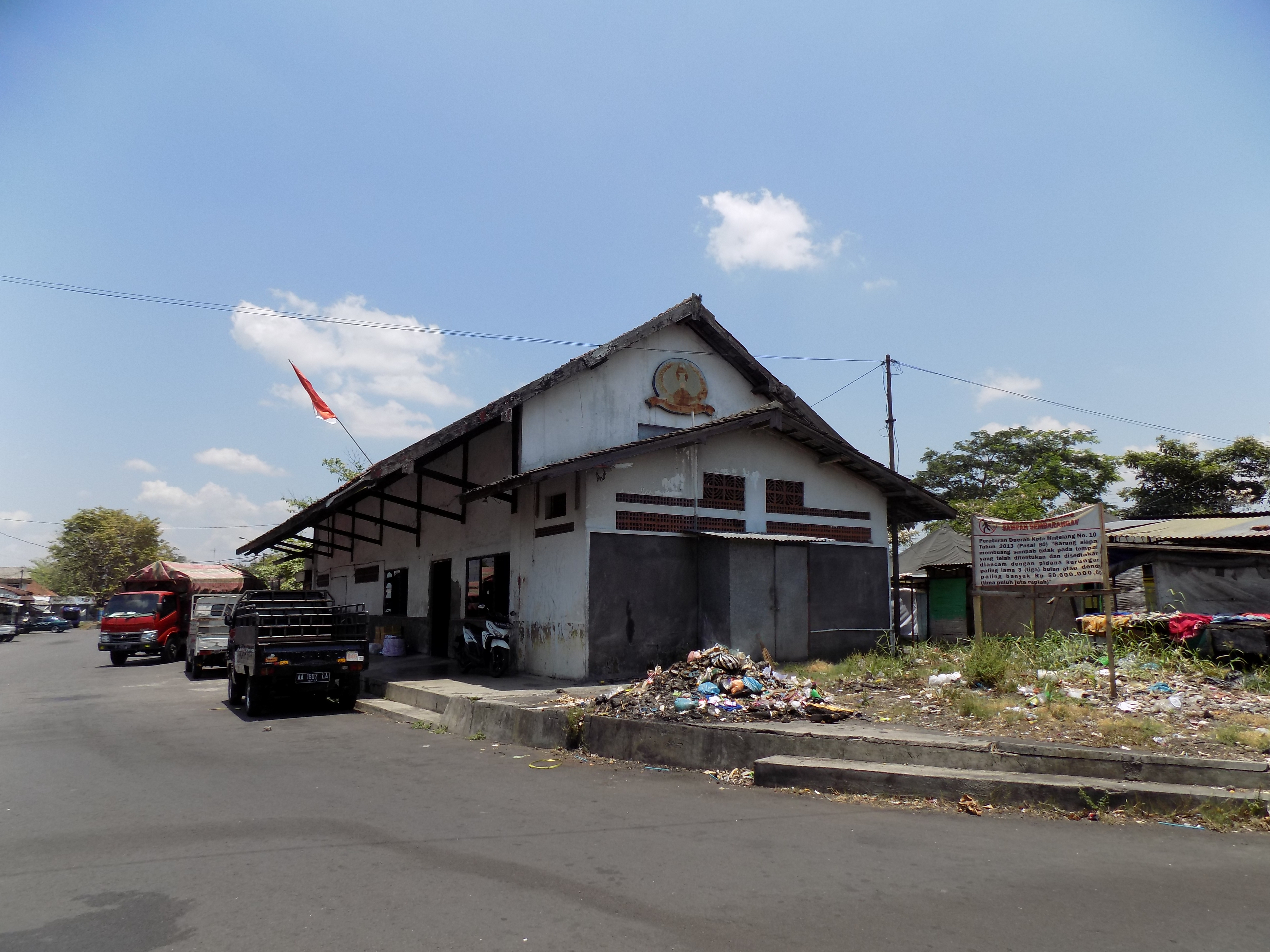 Stasiun Magelang Kota yang telah menjadi terminal angkot